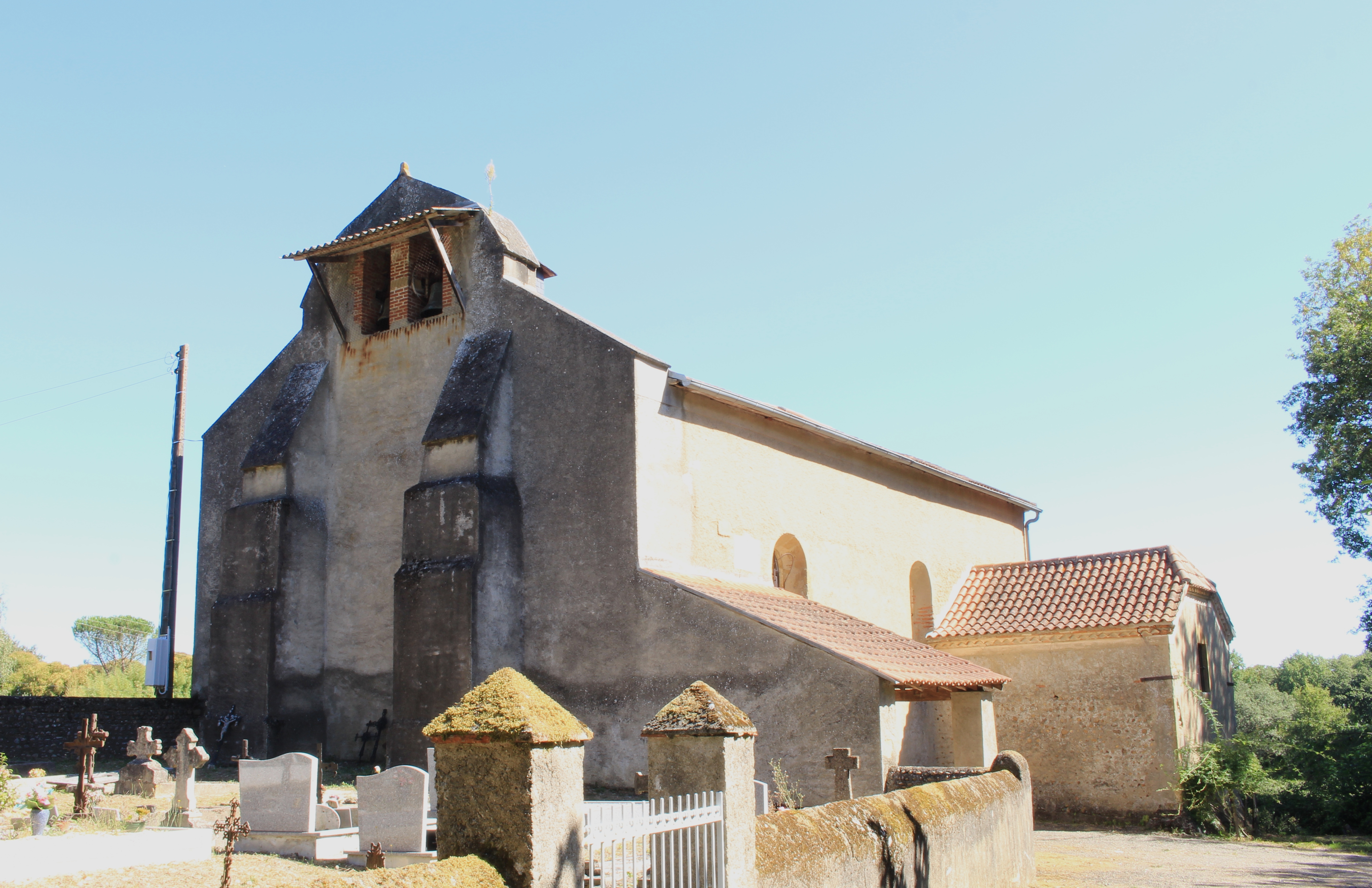 Église de l'Assomption de Villefranque (Hautes-Pyrénées)